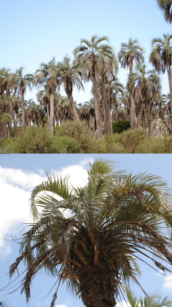 Butia capitata. Arecaceae. Fotos tomadas al margen de la Cañada del Paso del Bañado cerca a la Laguna Negra en la Ruta 16, Palmares de Castillos, departamento de Rocha, Uruguay.